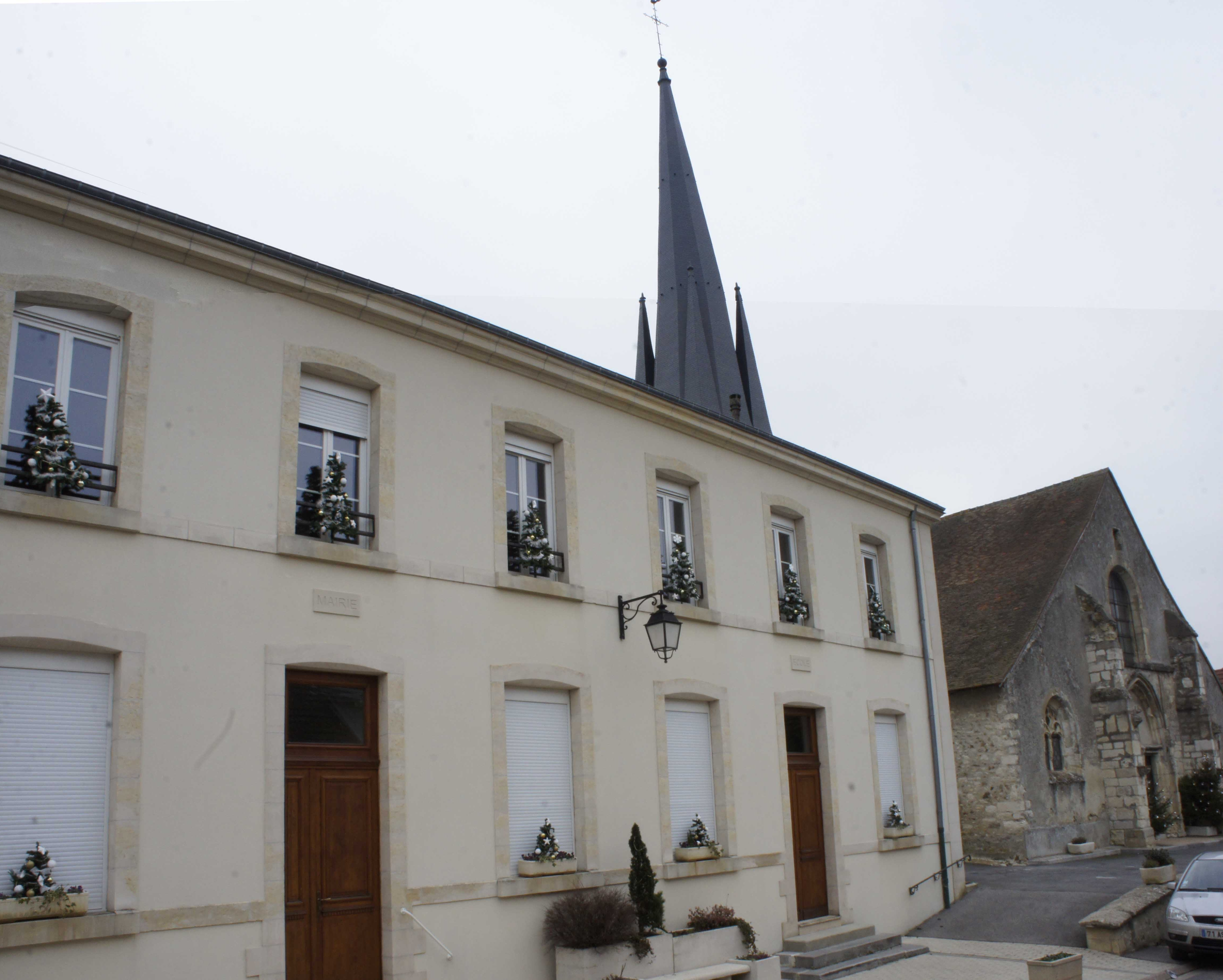 Mairie église à Chamery .